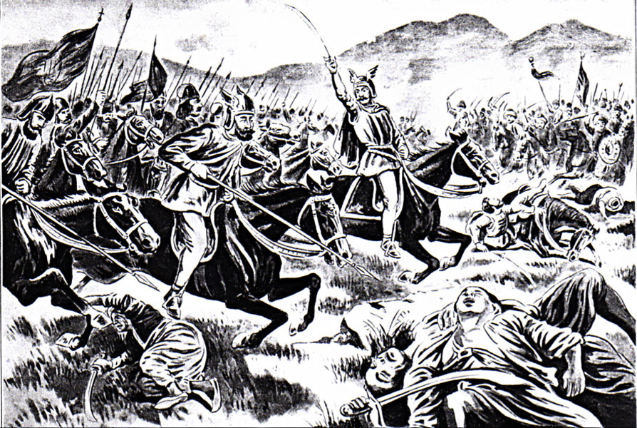 Српски (ћирилица): Бој на Косову 15. јуна 1389. год. Издаје Коста Мандровић у Бечу.